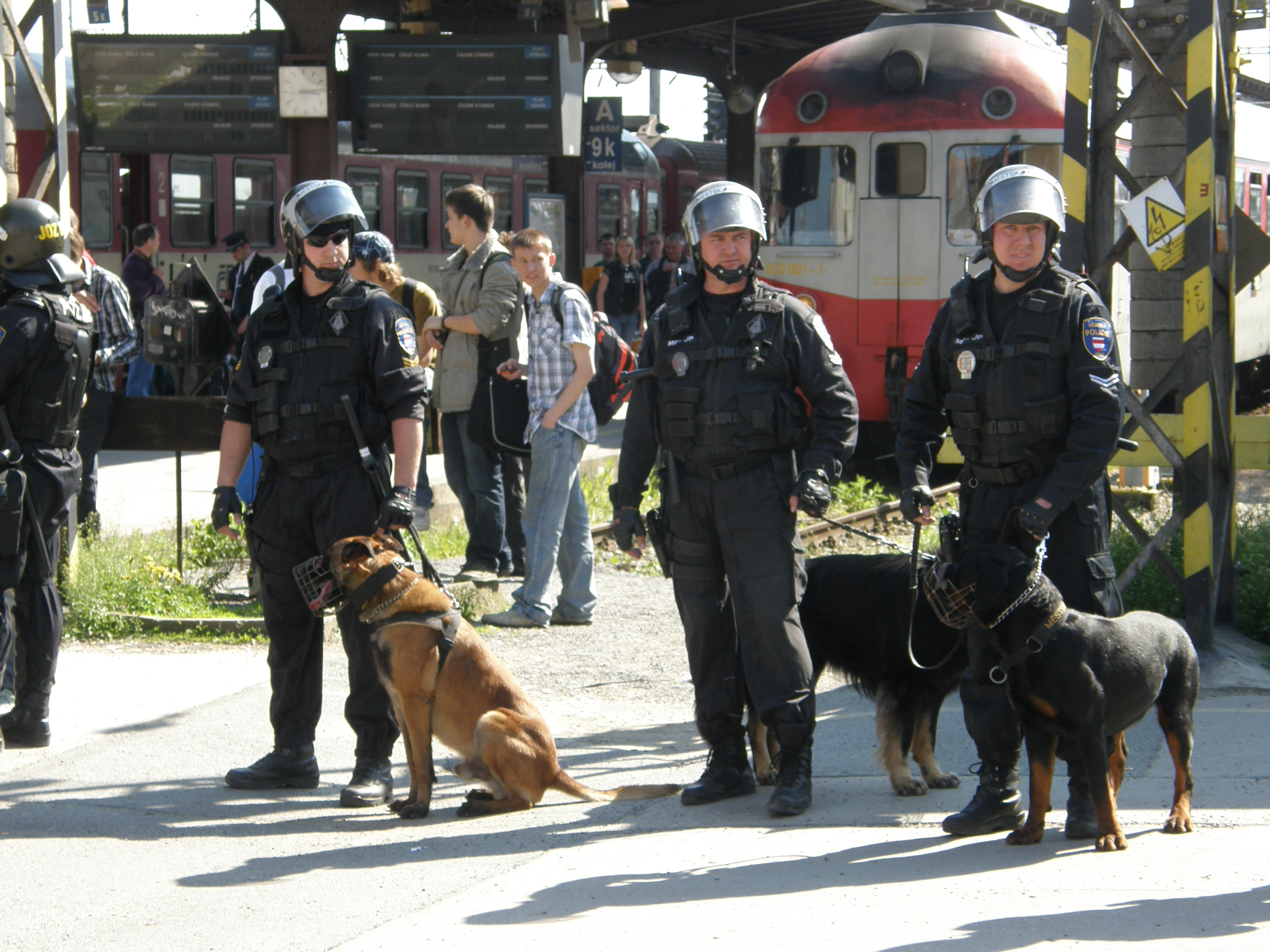 Czech police (Brno)